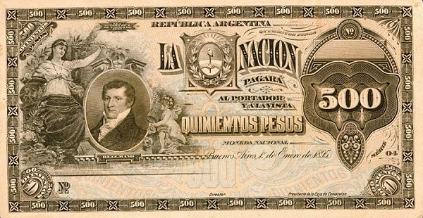 República Argentina - Caja de Conversión 500 peso State államjegy 1895.